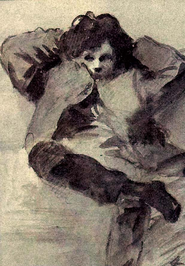 Ritratto di non identifie, acquerello, collezione privata